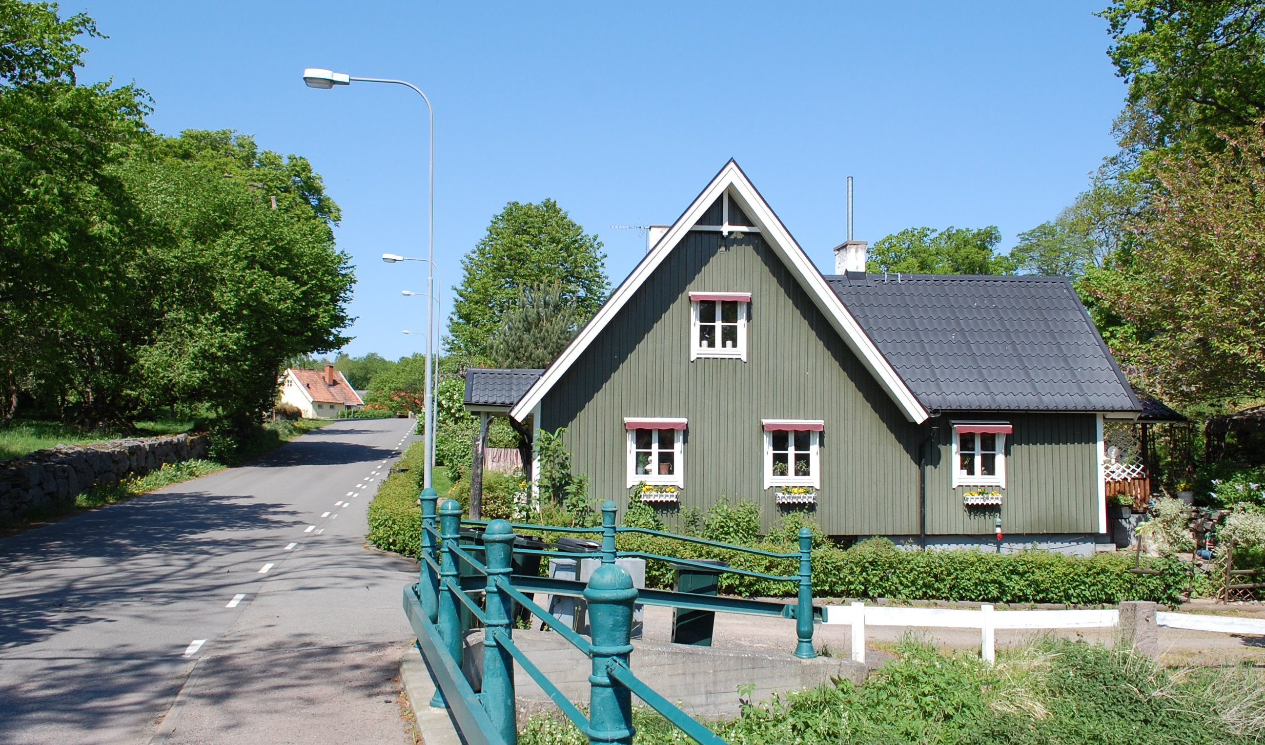 Häuser in Torsebro